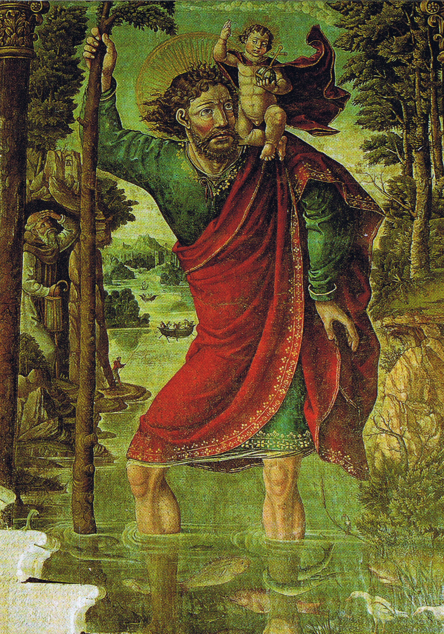 San Cristobal de la puerta de la Catedral de Zamora (España)